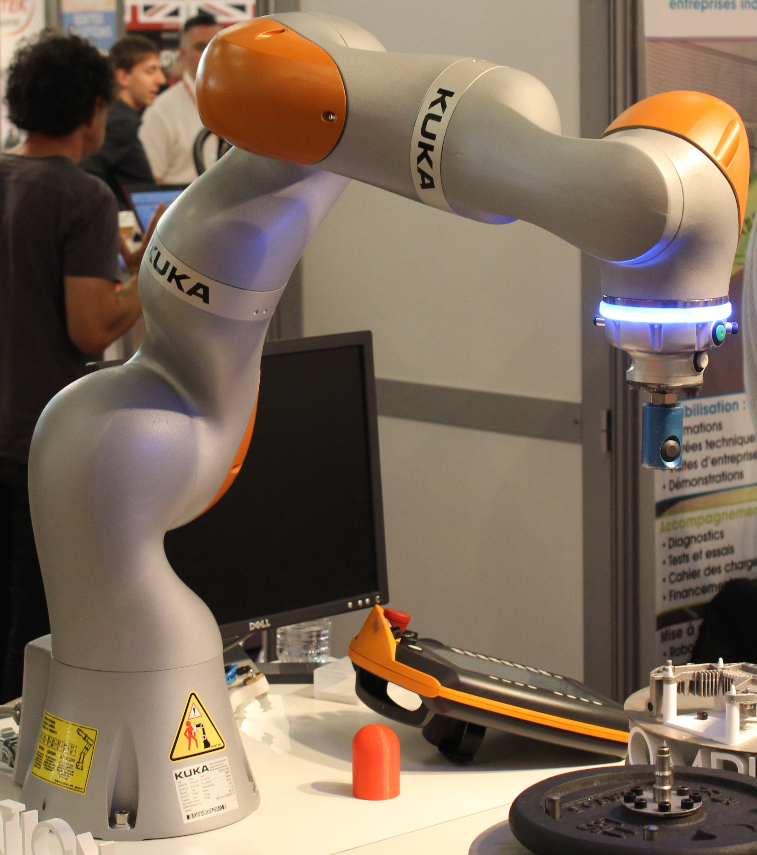 Un bras de l'entreprise Kuka Robotics au salon Innorobo à Lyon en 2015.